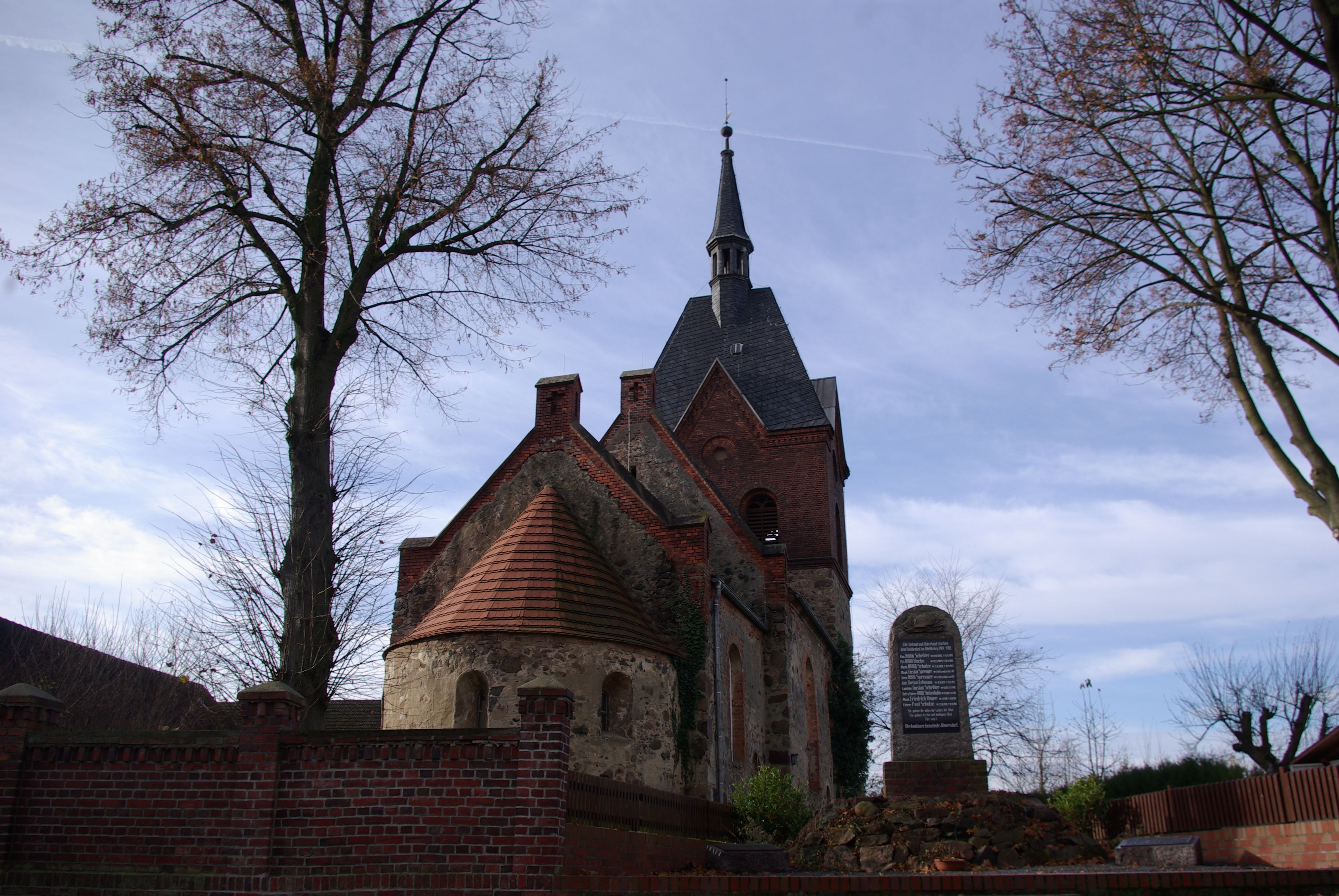 Ihlow Ortsteil Illmersdorf in Brandenburg. Die Dorfkirche stammt aus dem 13. Jahrhundert und steht unter Denkmalschutz.